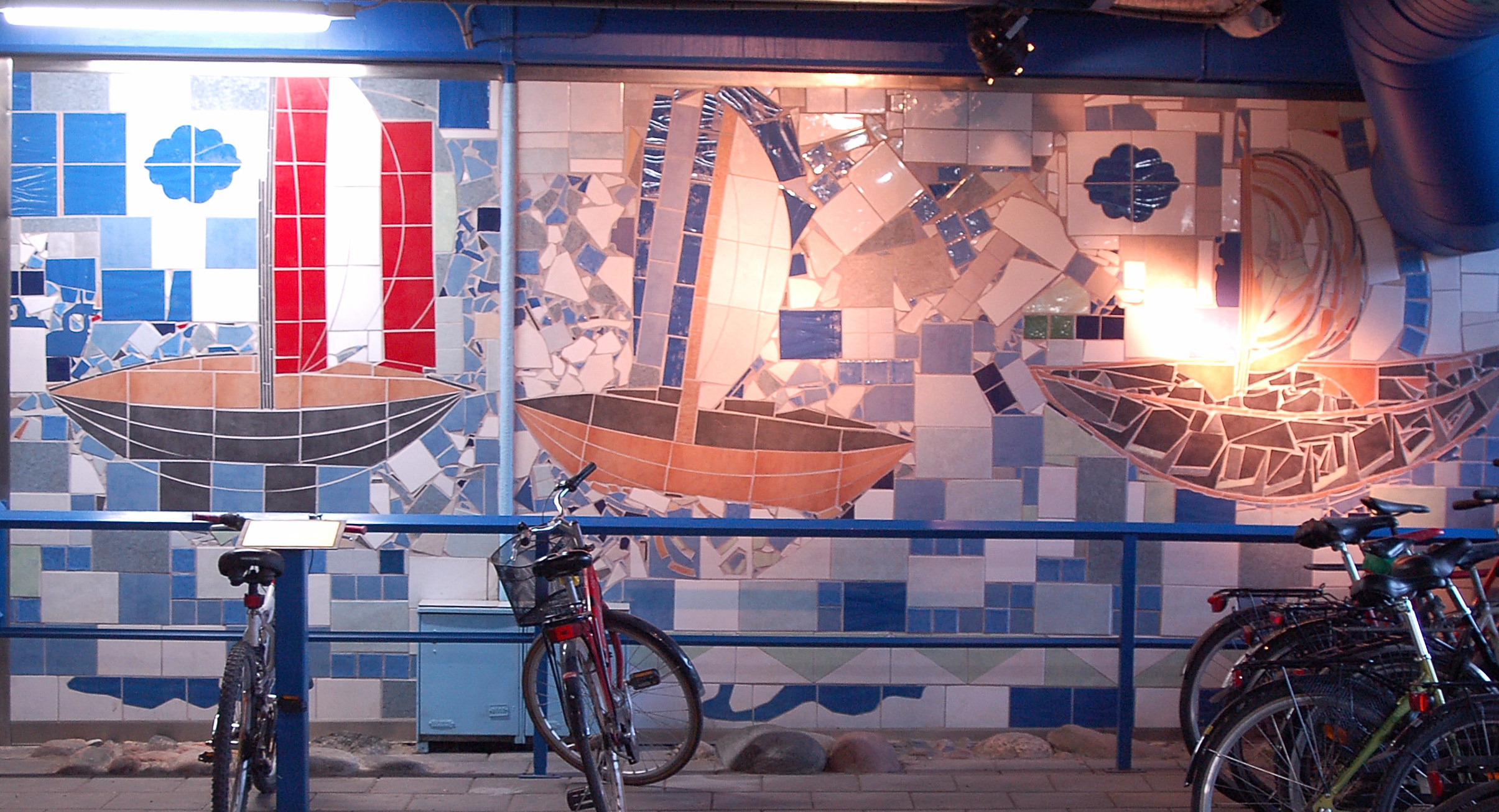 Blue Corner av Björn Wilde 2004 placerad i Orrholmsgaraget, Karlstad.